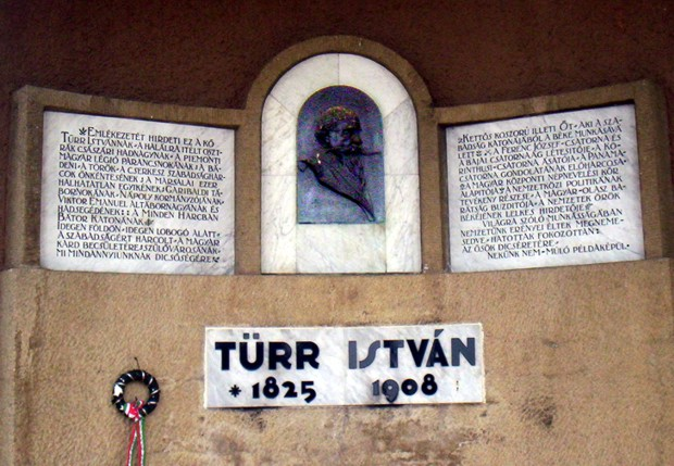 Türr István emlékmű, Baja